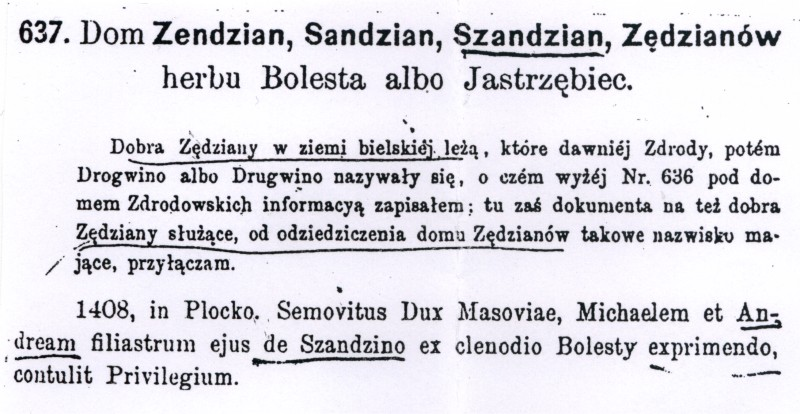 Dane z Herbarza Kapicy-Milewskiego